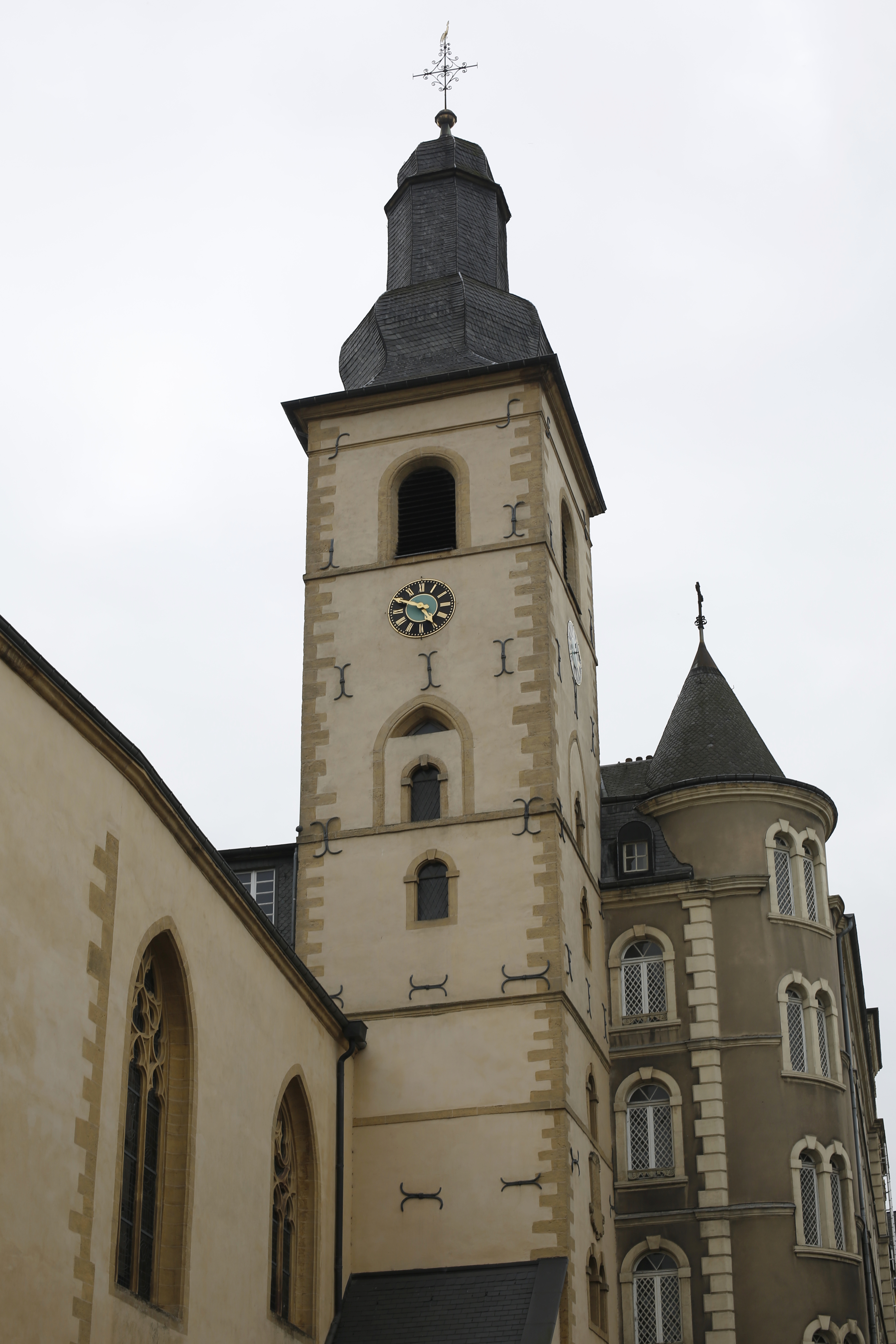 Clocher de l'église Saint-Michel de Luxembourg.